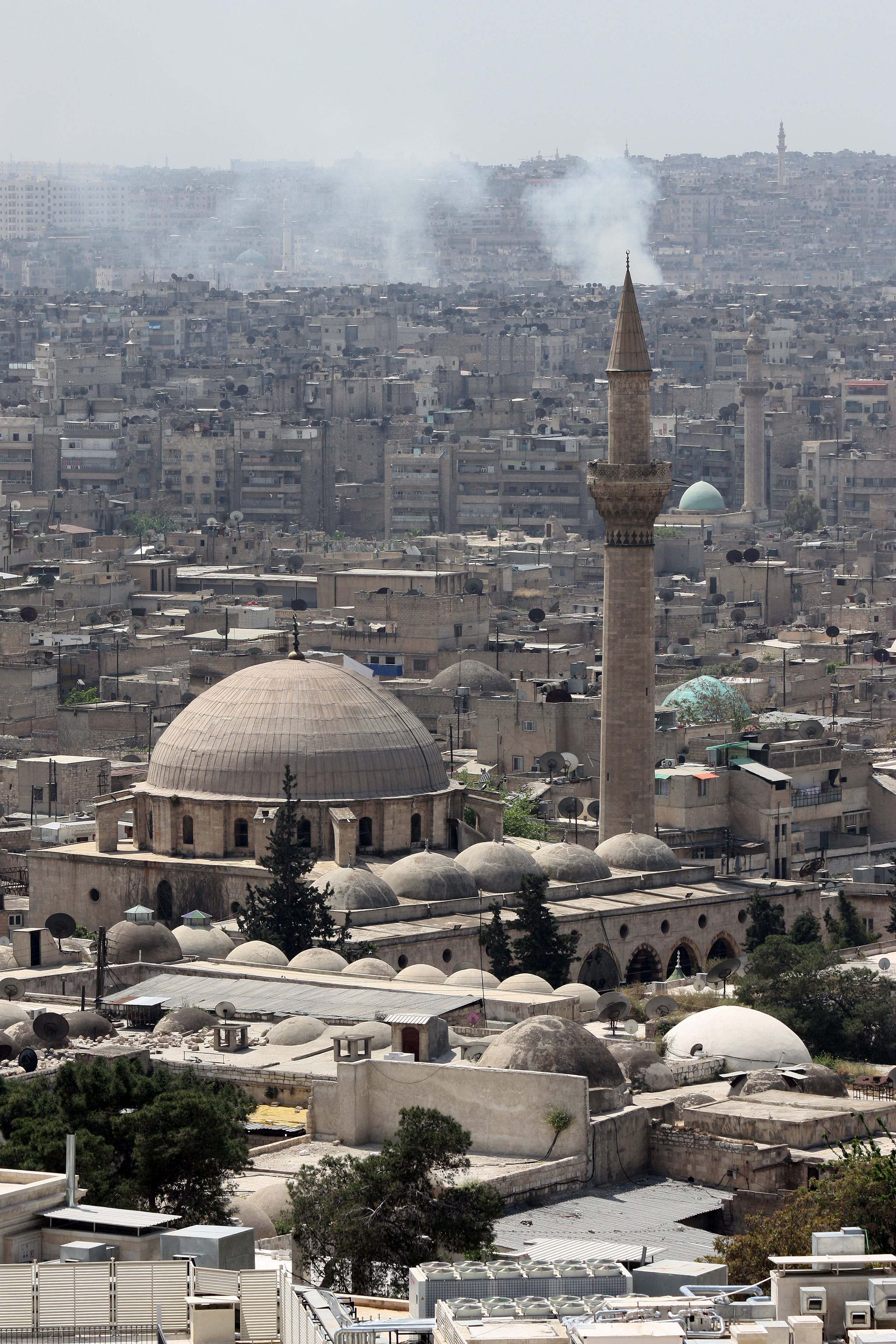 Al-Adiliyah mosque in Aleppo, Syria.